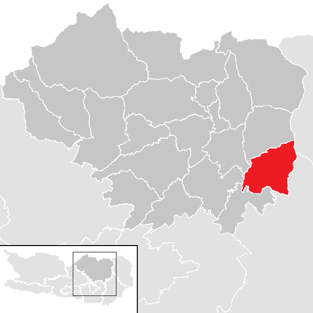 Bezirk Sankt Veit an der Glan